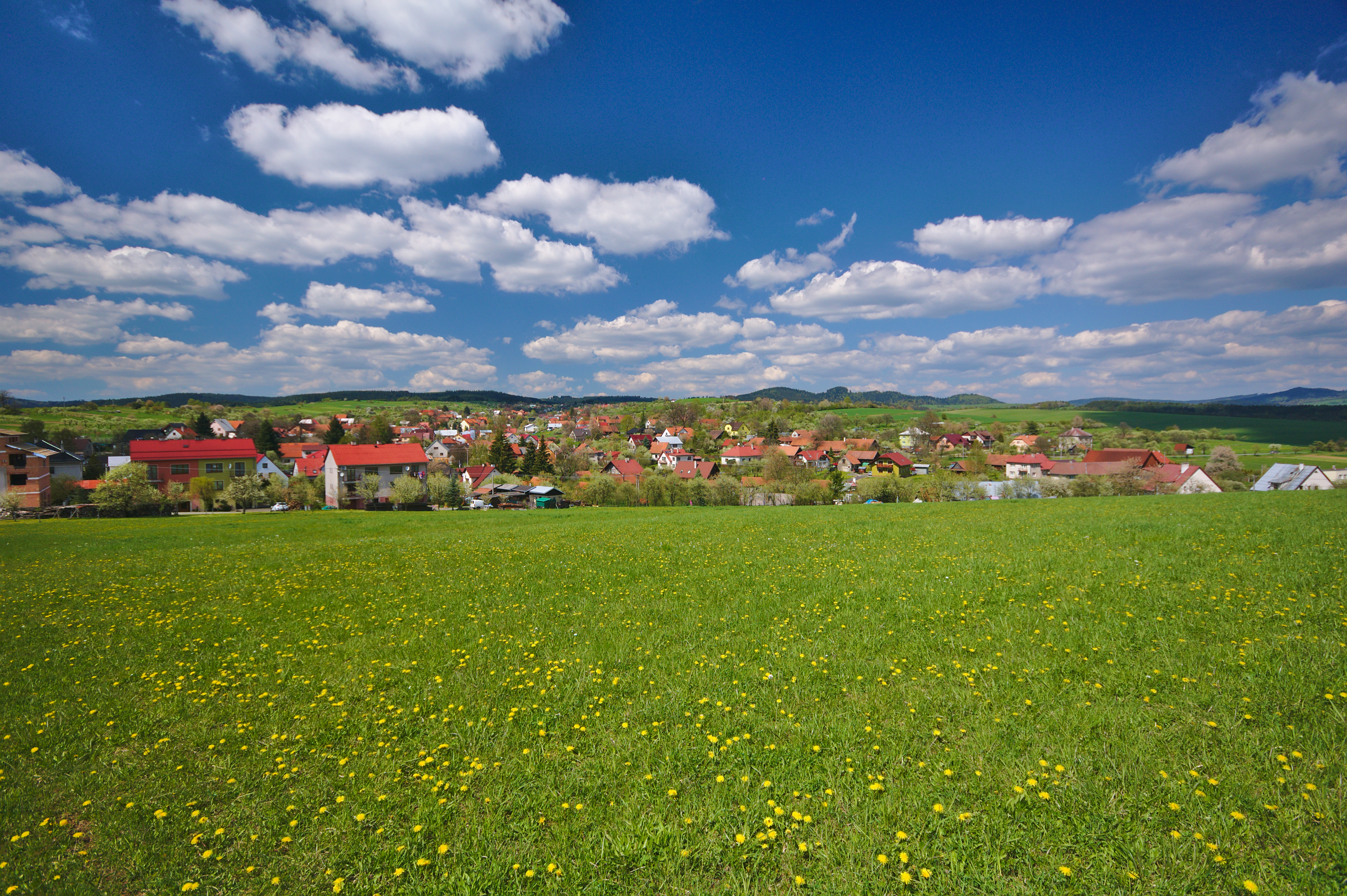 Pohled na vesnici od kostela, Lačnov, okres Vsetín